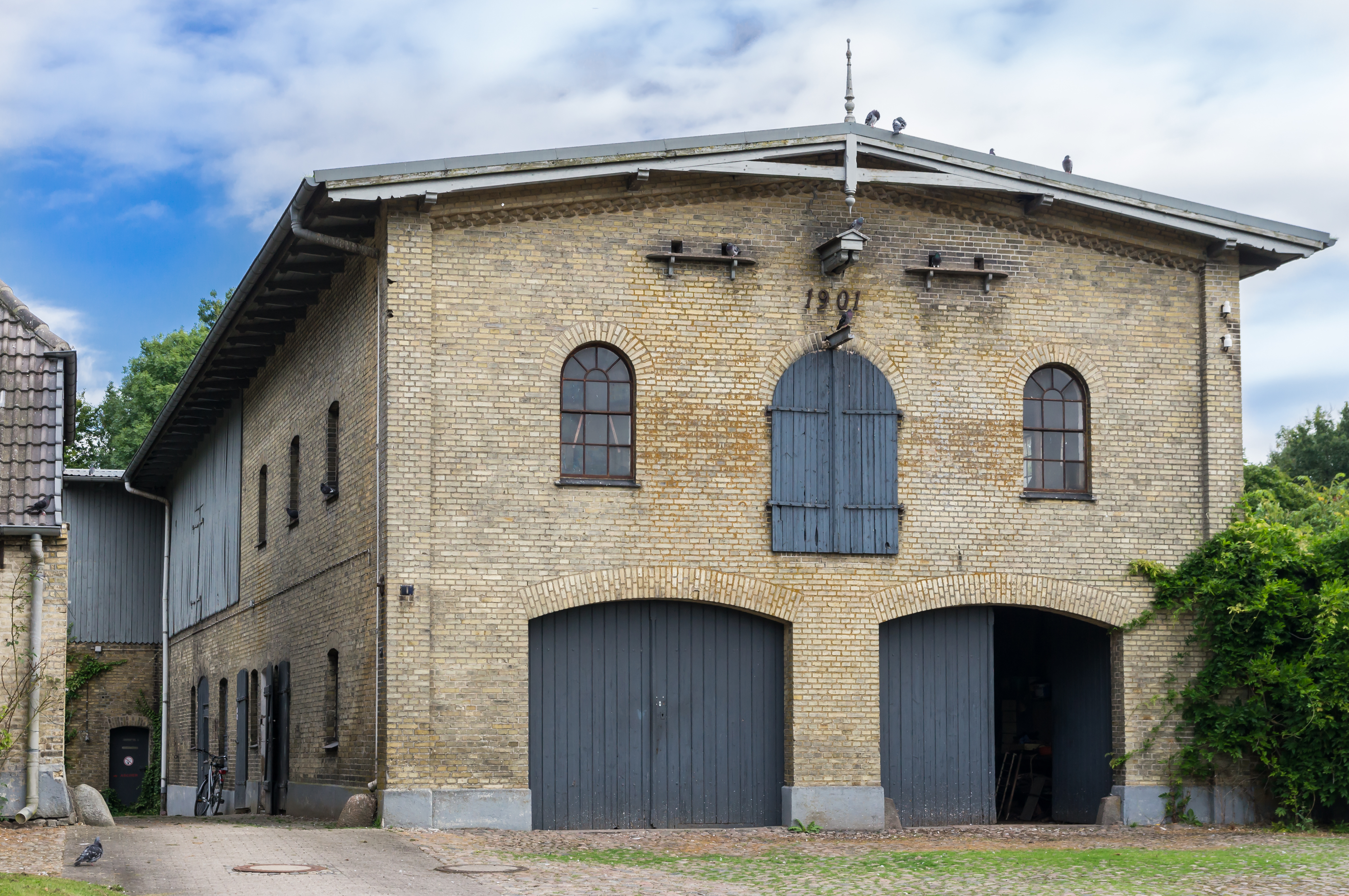 Flensburg-Fruerlund, Alt-Fruerlundhof 1, Wirtschaftsgebäude, Denkmal-Nr. 1.2